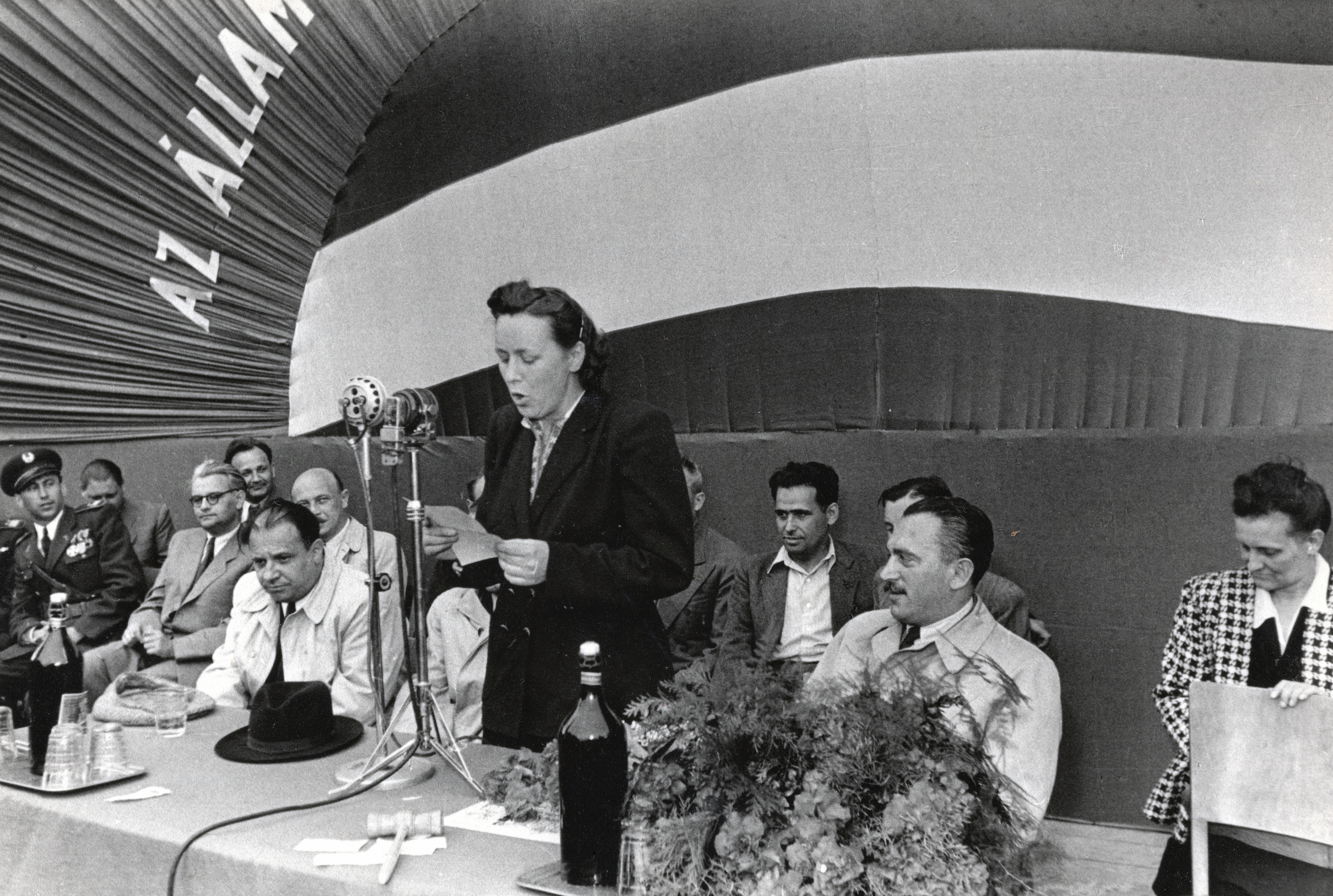 Magyar Vagon- és Gépgyár (MÁVAG). A felvétel a gyár dolgozói által a Belügyminisztérium Államvédelmi Hatóságának (BM ÁVH) adományozott csapatzászló átadásakor készült. A szónok a zászlóanya Farkas Mihályné (Käthe Rüdiger) mellette balra Farkas Mihály, mögötte szemüveggel Zöld Sándor, félig takarva Donáth Ferenc. Jobbra a virágcsokor mögött Péter Gábor.